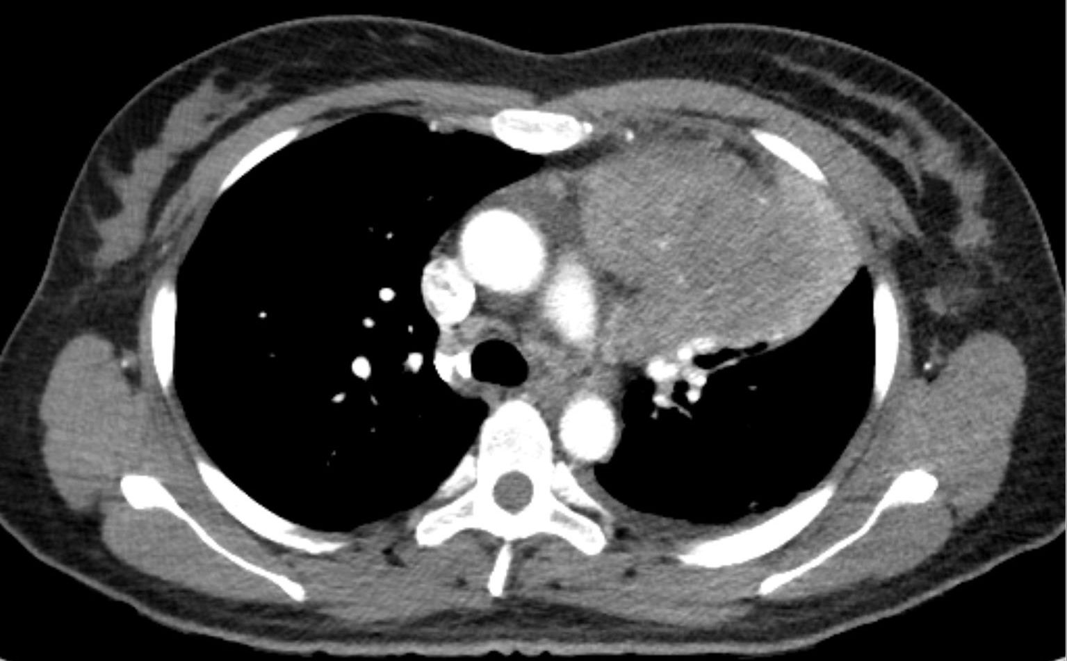 Malignes Thymom / Thymuskarzinom in der Computertomographie (axial). Die Histologie erbrachte ein primäres Karzinom des Thymus vom Plattenepithelial-Typ, dem häufigsten Typ des Thymuskarzinoms. Das CT zeigt eine große, nicht scharf begrenzte Formation im vorderem Mediastinum mit Verdrängung der Lunge und Zeichen einer möglichen Infiltration in Nachbarstrukturen. Inhomogene Kontrastierung. Zysten oder Verkalkungen fanden sich in diesem Fall nicht.